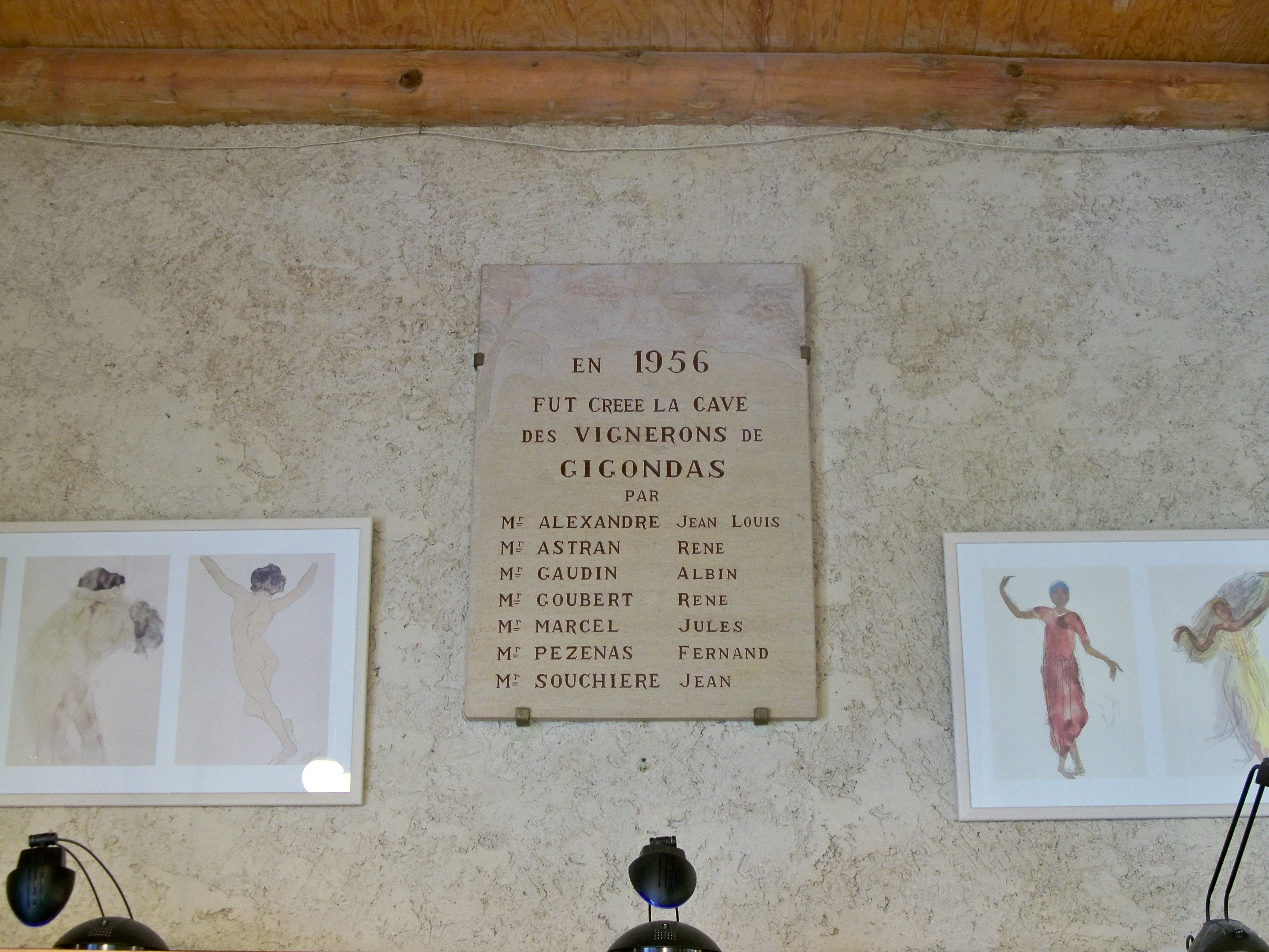 plaque commémorative de la fondation de la cave de Gigondas, Vaucluse